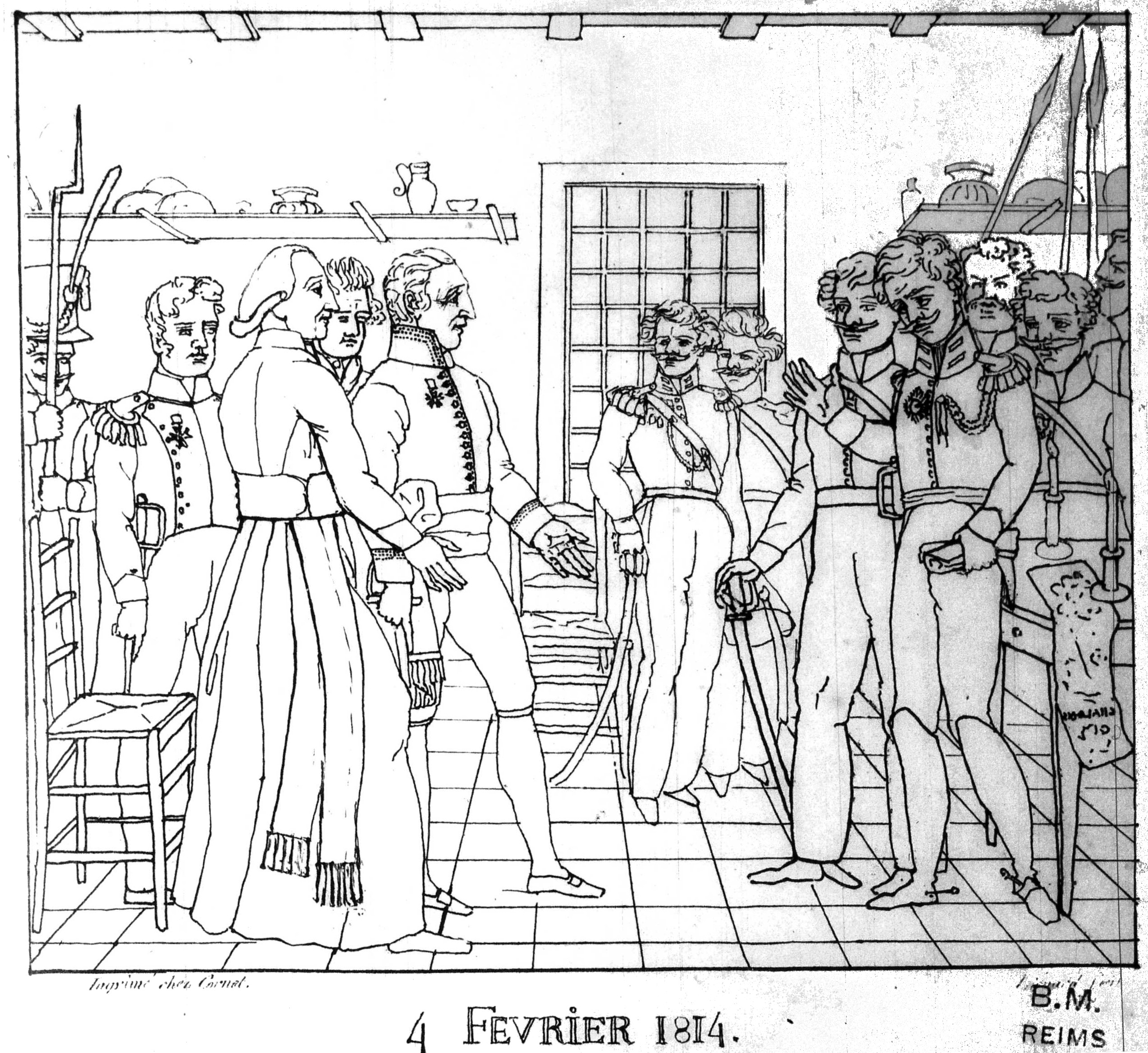 vue de